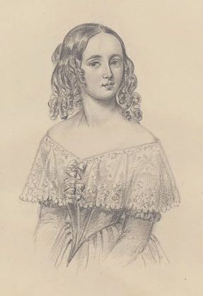 Julie Berwald (1822-1877)